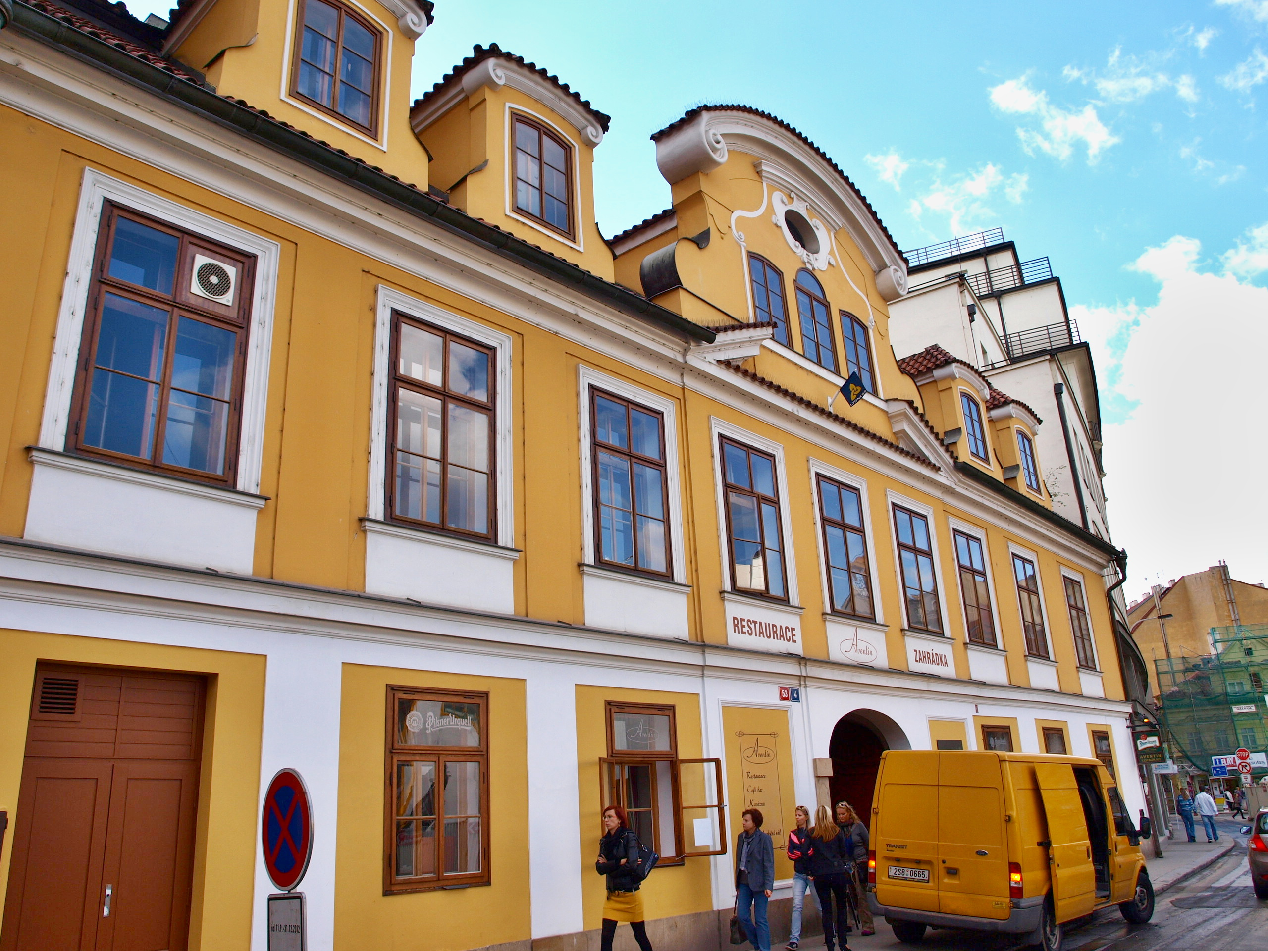 Palác Aventin, Praha-Nové Město